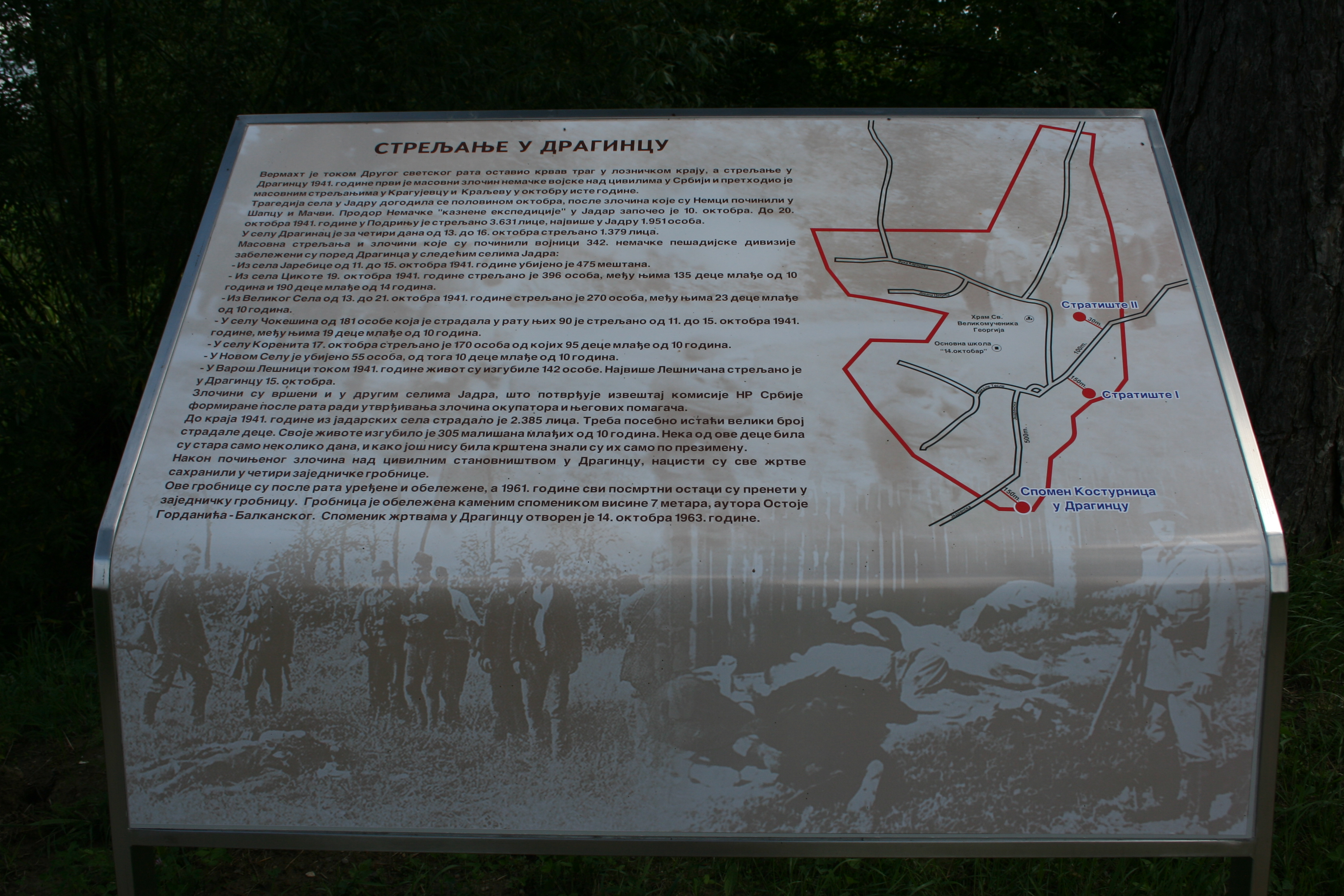 Spomenik i kosturnica, Draginac